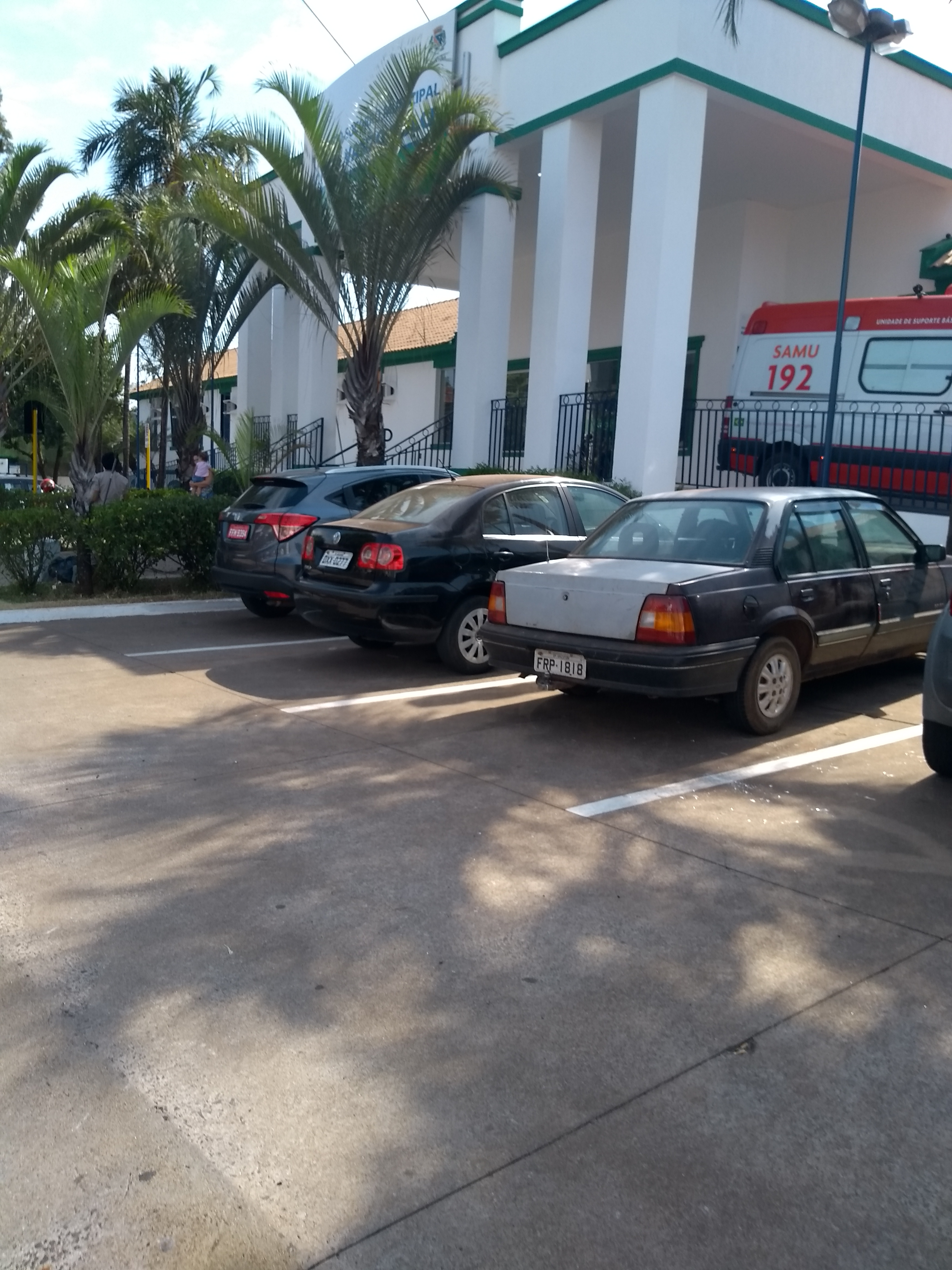 Fachada do pronto socorro Aida Vanzo Dolce em Araçatuba.